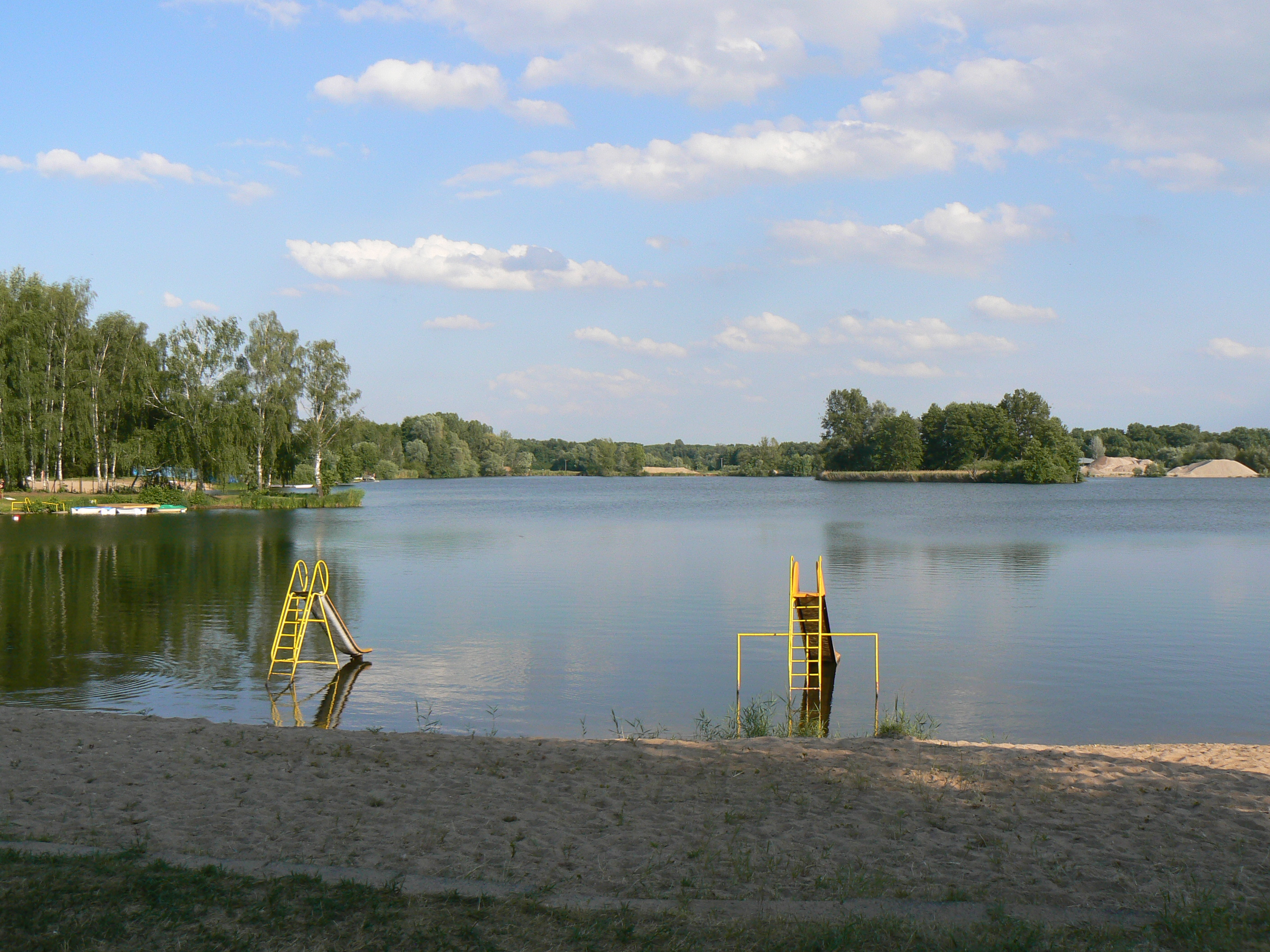 Pláž u Jezera v Poděbradech